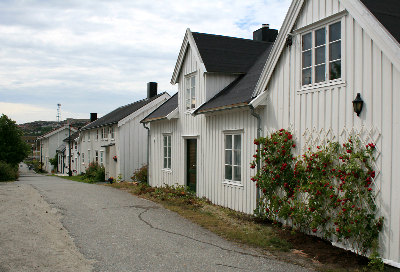 Torggata, Rørvik, Nordland, Norway.